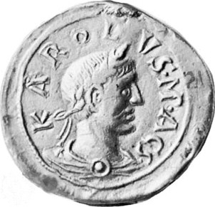 Sceau de Charles III le gros, IXème siècle. Bayerisches Nationalmuseum, Munich.